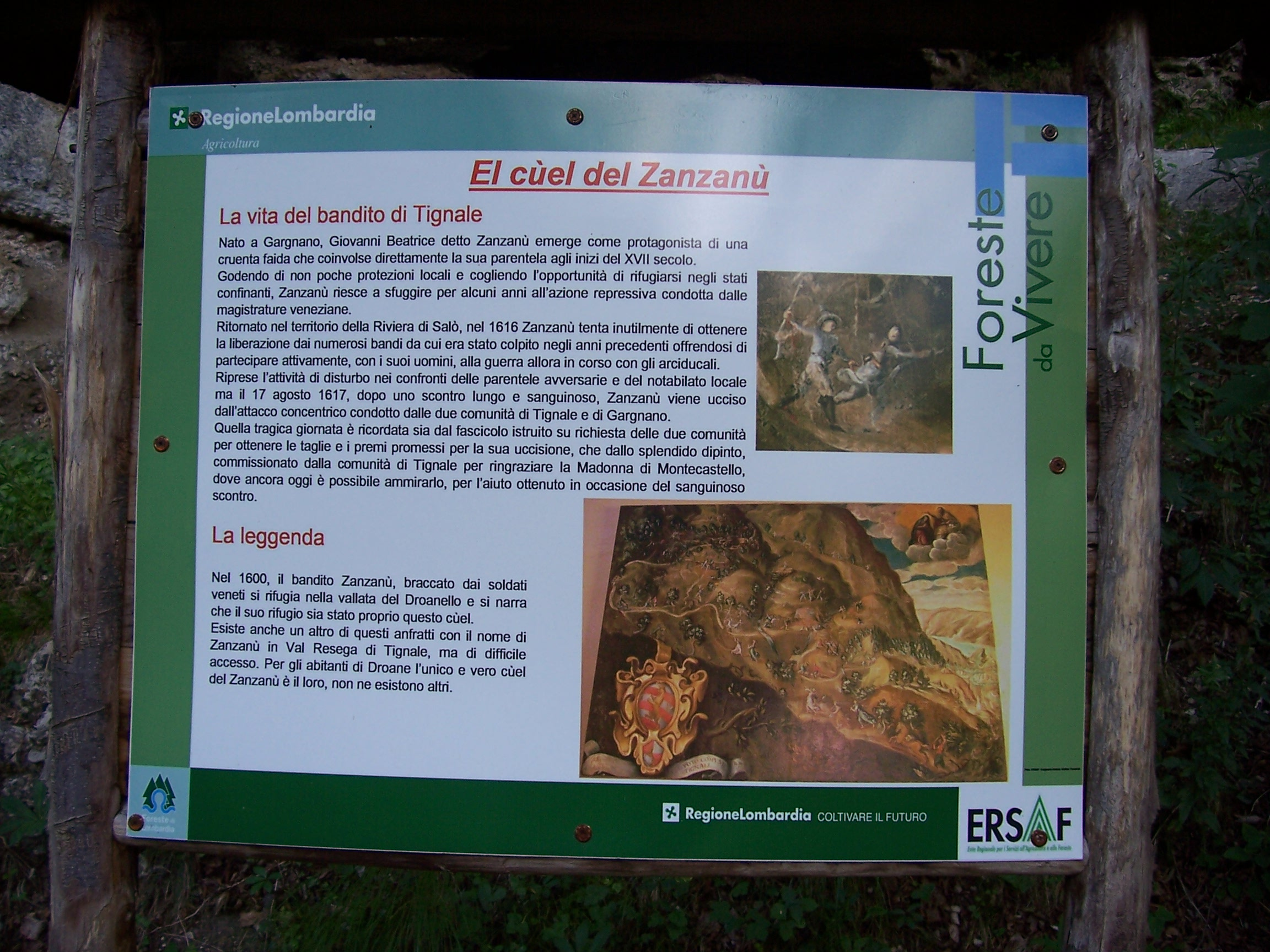 Cùel Zanzanù in Valvestino